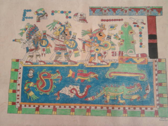 codice mixteca